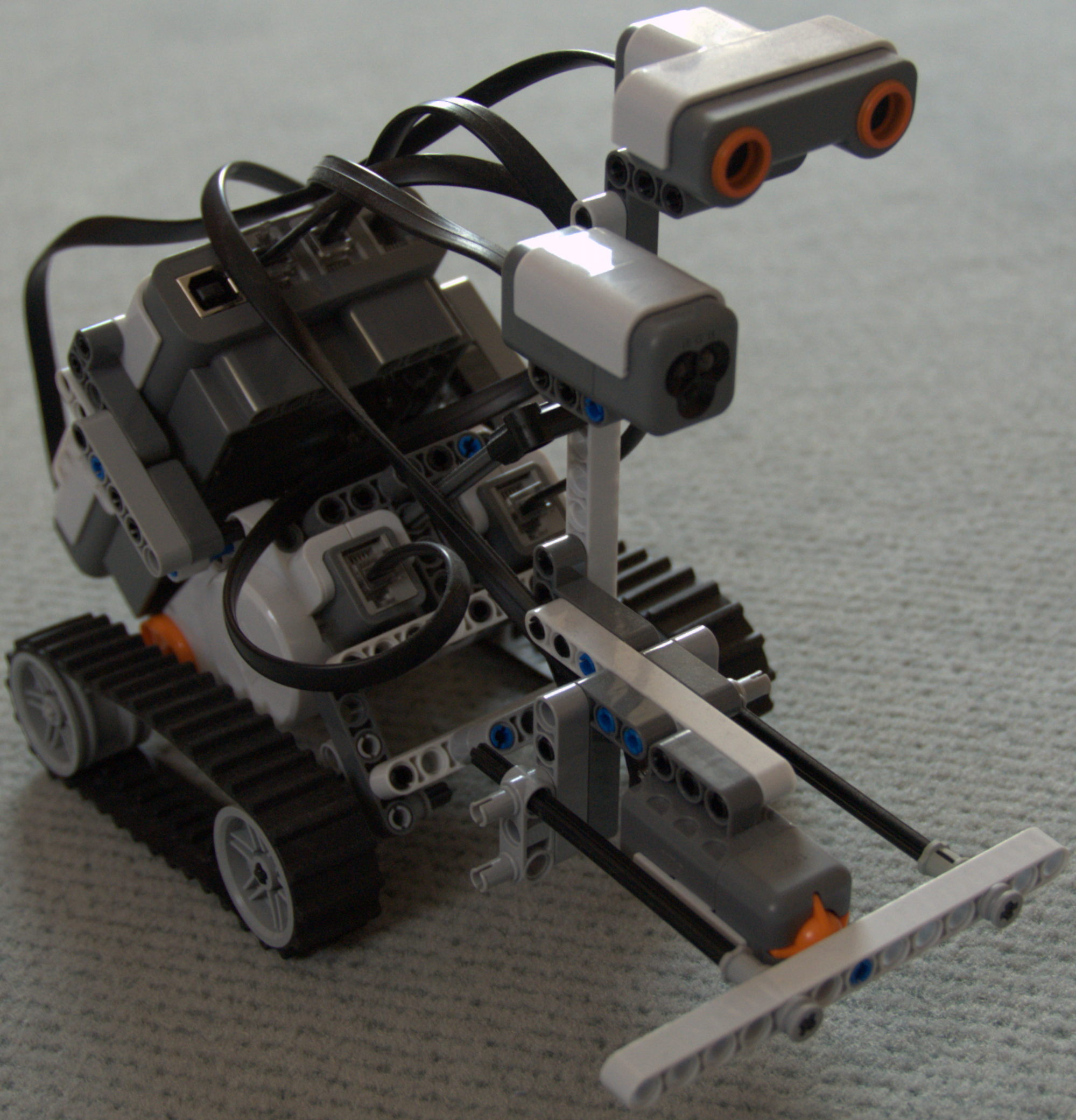 Ein, aus dem Lego Mindstorms Set 8547, zusammengebauter Roboter.